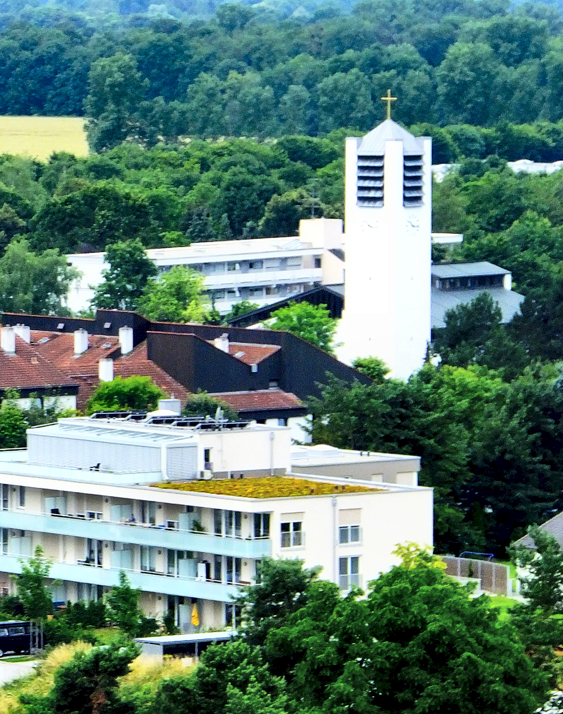 Neue Pfarrkirche St. Ulrich in Unterschleißheim